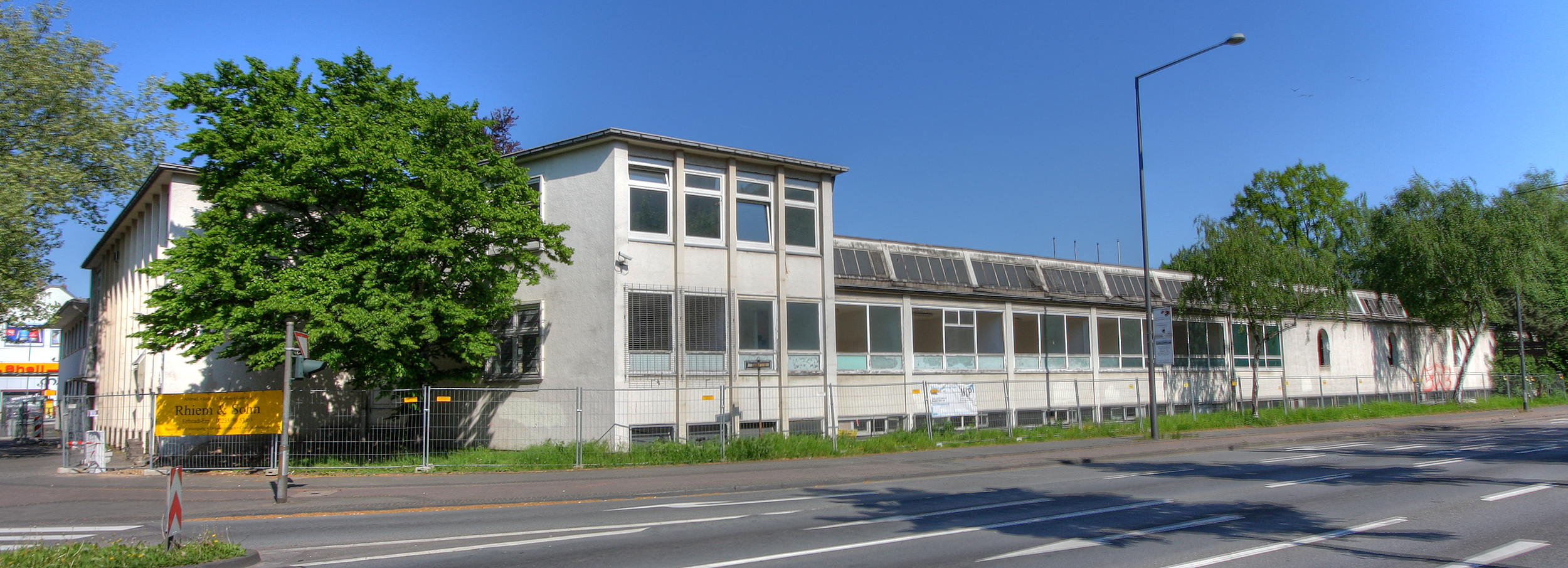 Ehemalige Moschee in Köln-Ehrenfeld kurz vor dem Abriss, Blick aus süd-südöstlicher Richtung